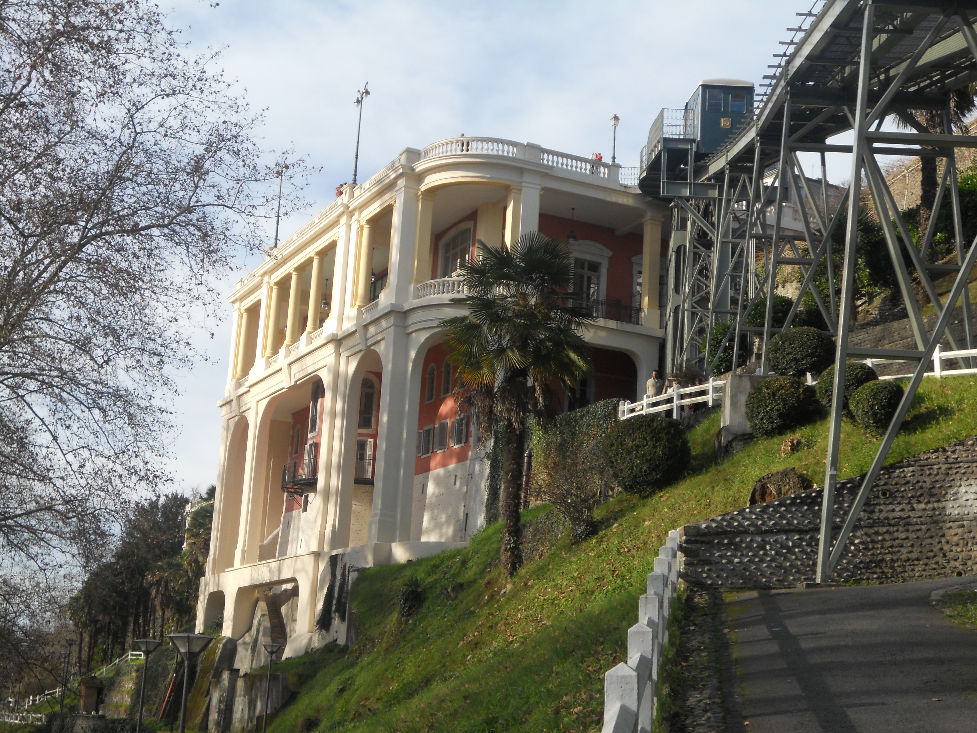 Le Pavillon des arts et le funiculaire de Pau depuis le bas du boulevard des Pyrénées